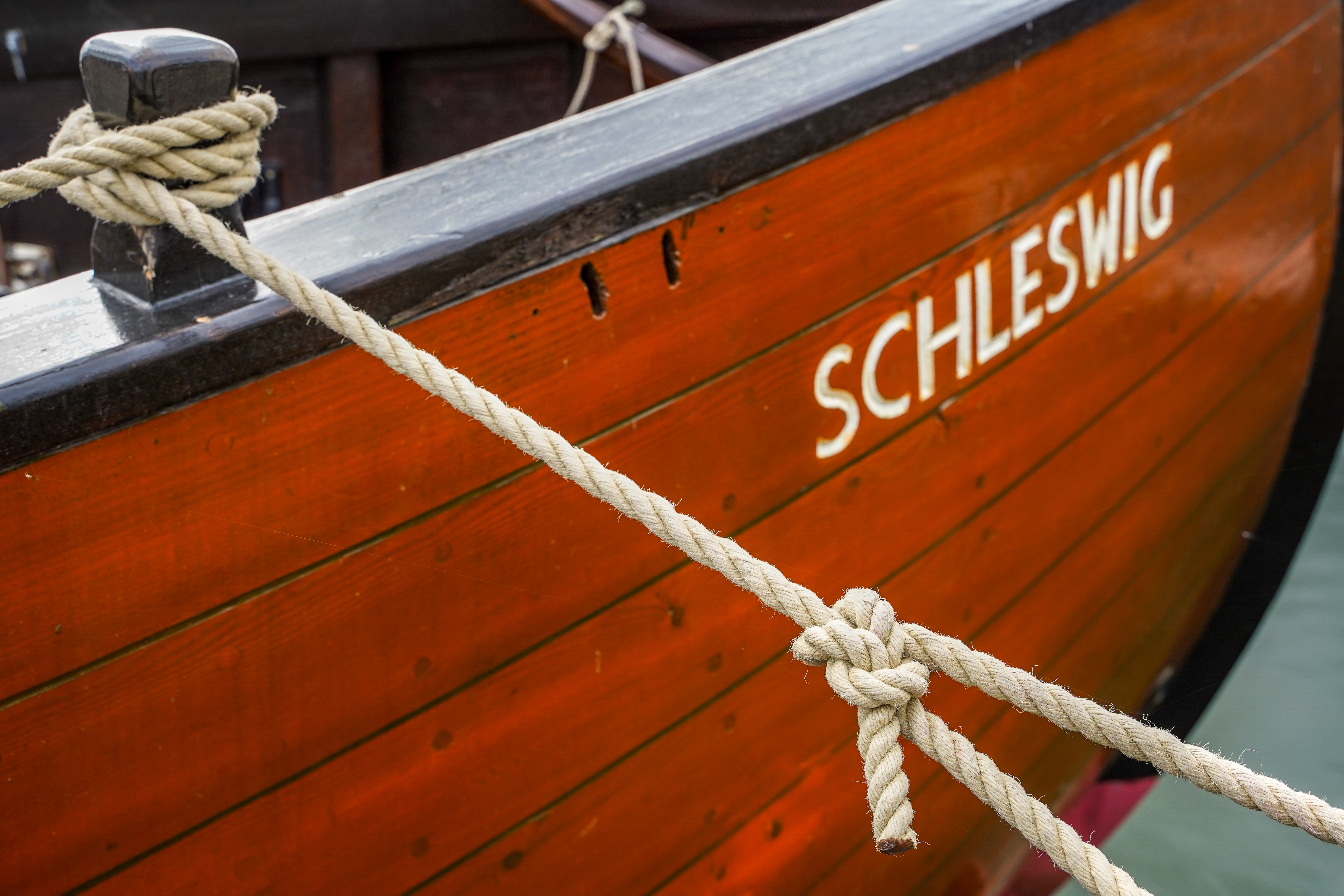 Sog. Jesus-Boot des Bibelzentrums Schleswig (Nachbau des Boots vom See Genezareth).